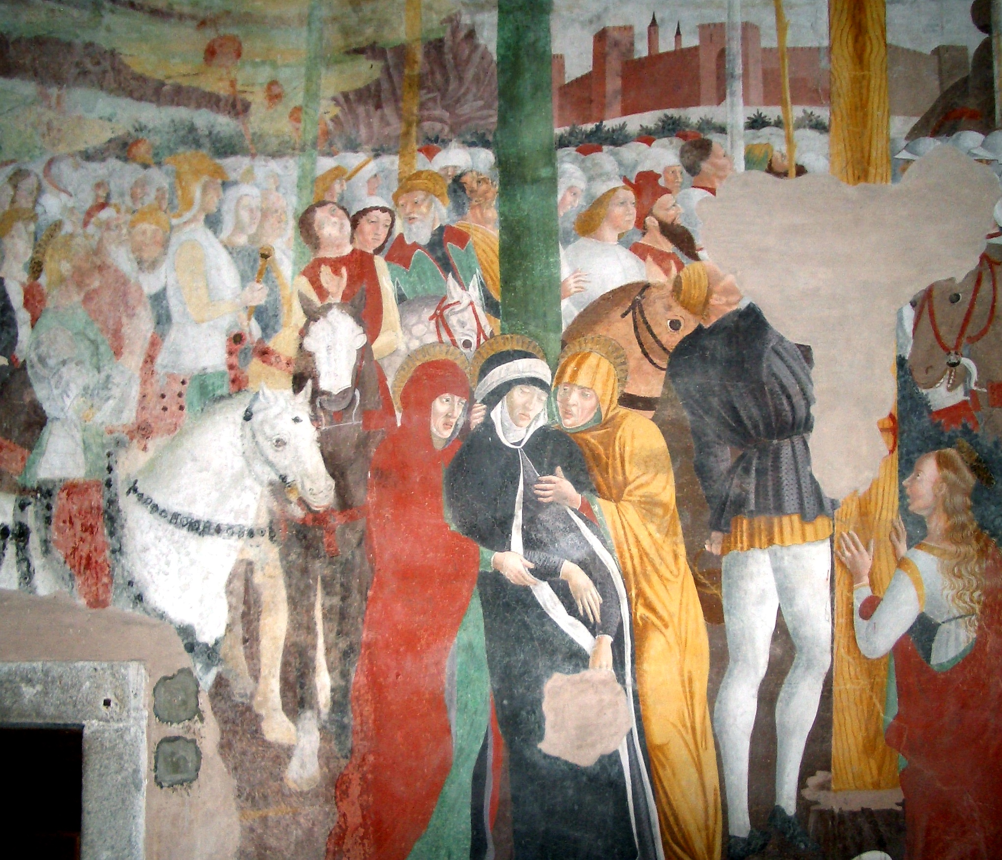 Giovanni Pietro da Cemmo, ‘’Crucifixion’’ (detail), fresco, 1483- 1486, San Rocco church, Bagolino, Brescia, Italy